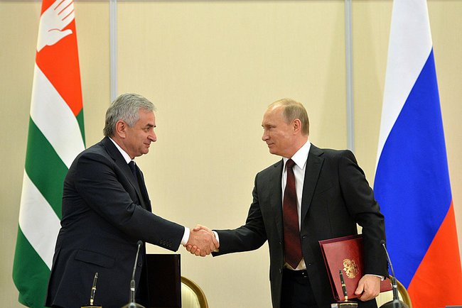 Владимир Путин и Рауль Хаджимба